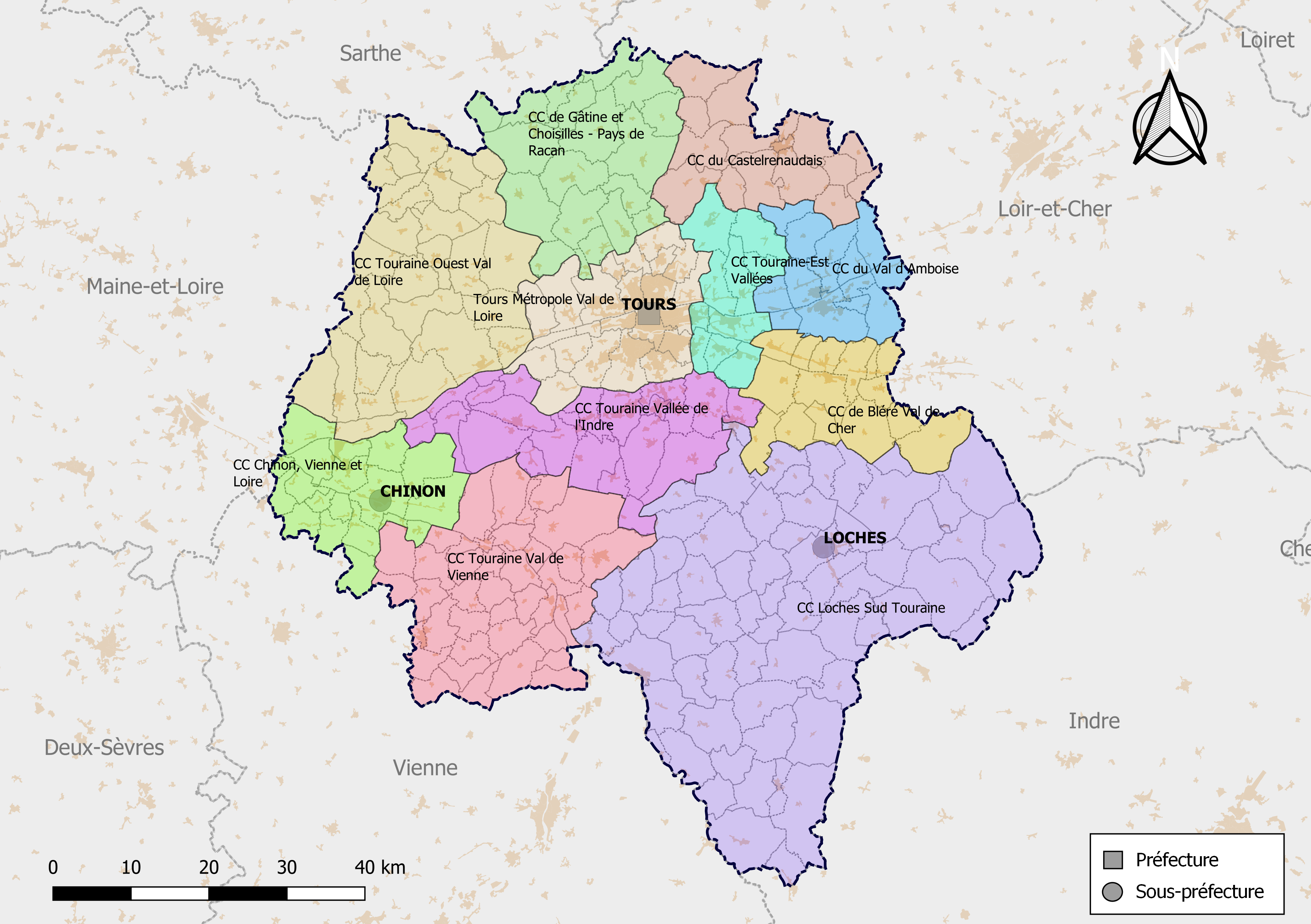 Carte des intercommunalités du département de l'Indre-et-Loire, France. Composition au 1er janvier 2019.